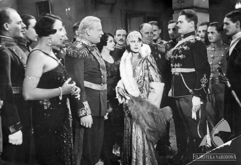 Кадр из фильма "Краса жизни" (Польша, 1930)